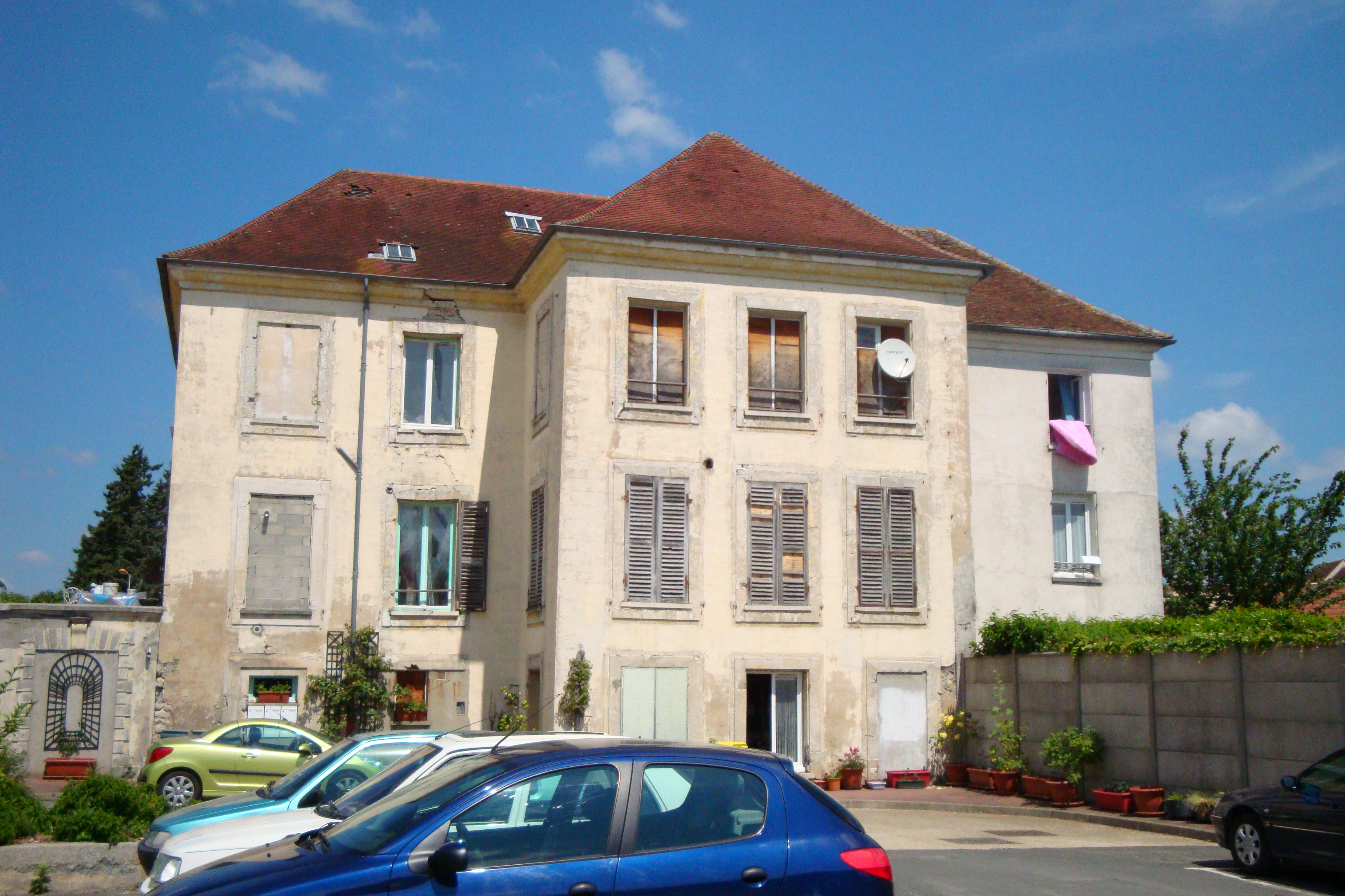 Ancien couvent des Minimes à Brie-Comte-Robert